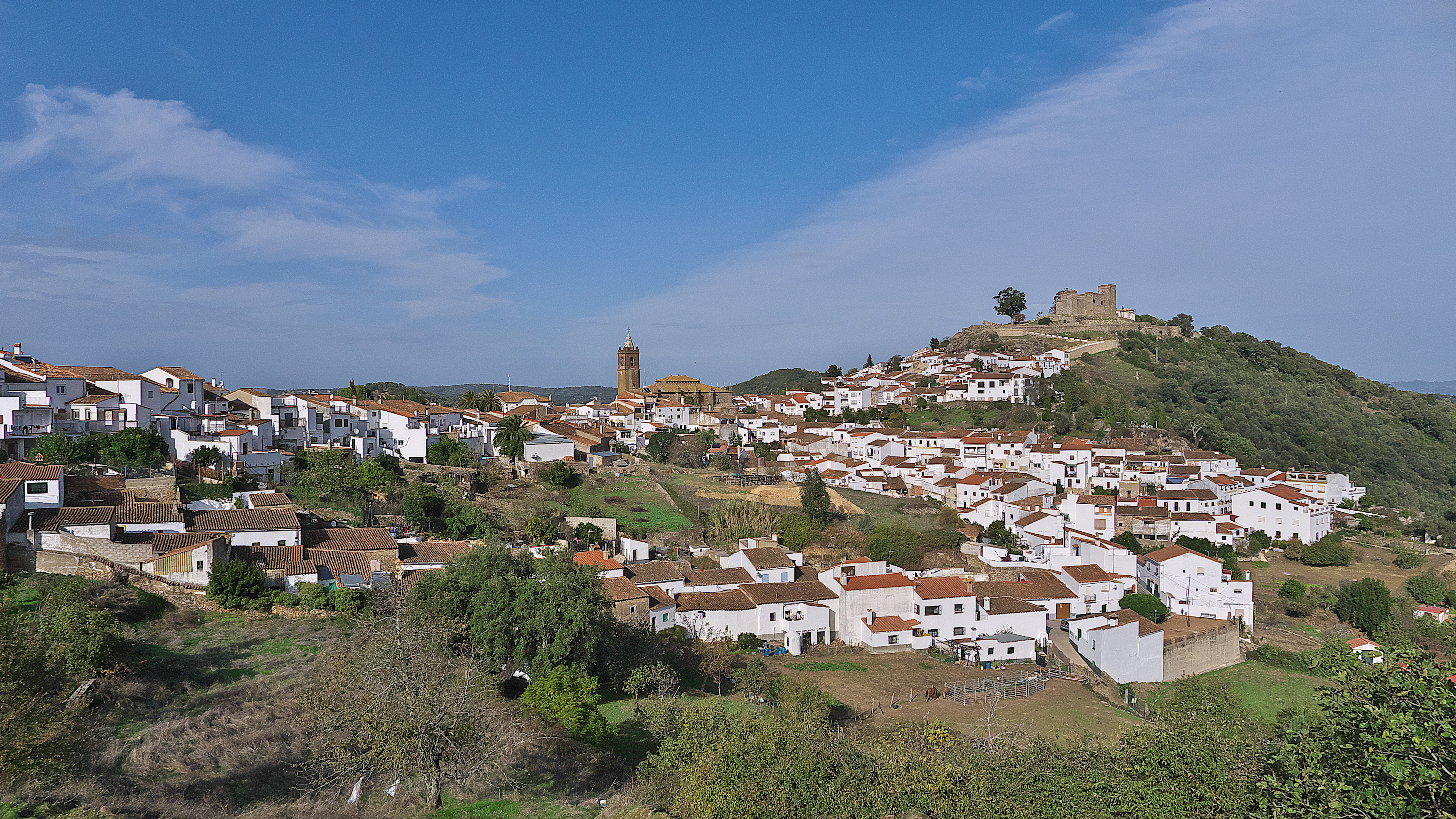 Fernando III de Castilla conquista Cartsana (1248) y Alfonso X la incluye en el alfoz de Sevilla (1253).